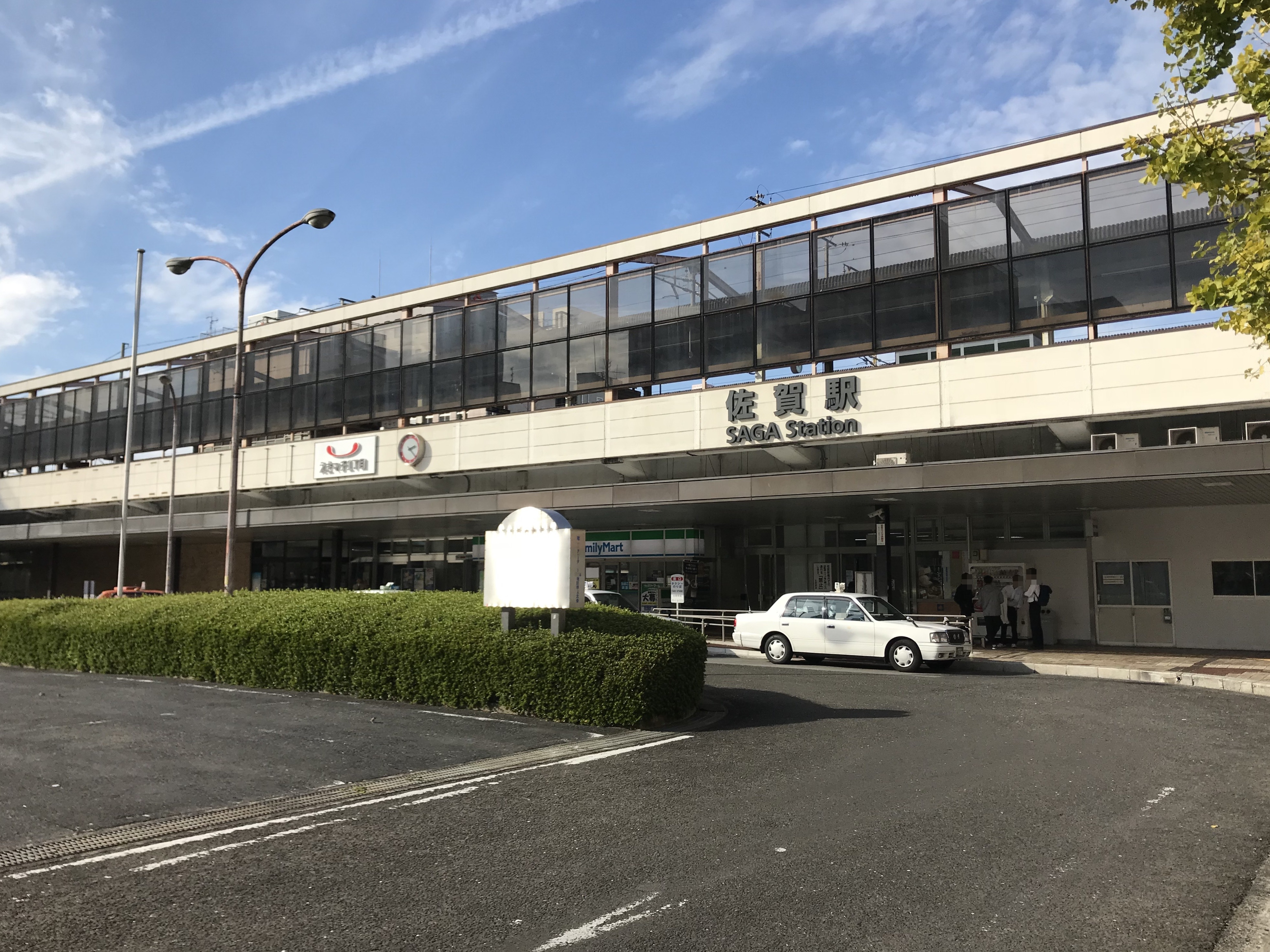 佐賀駅南口